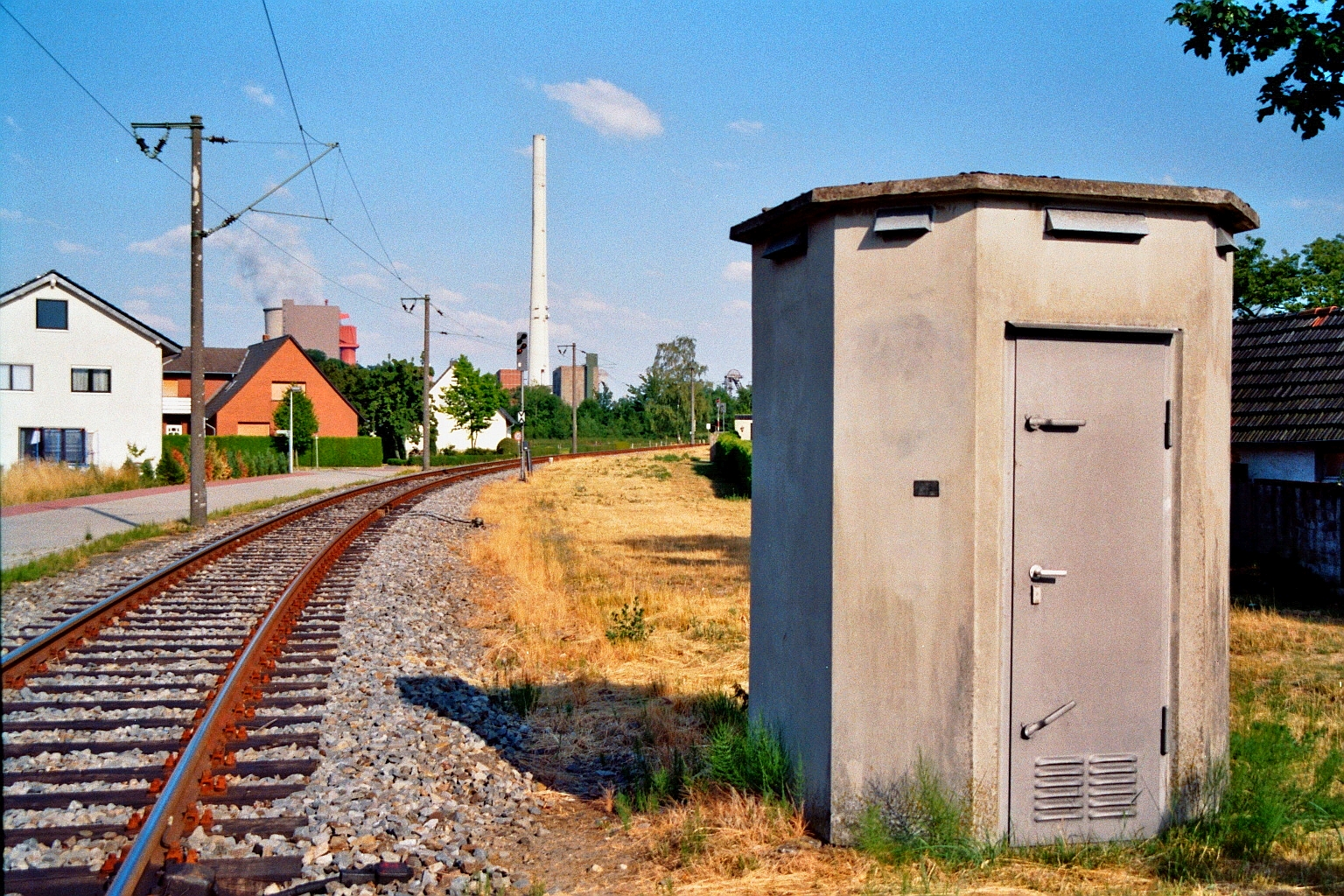 Gleisanlagen der Zechenbahn Ibbenbüren am Bahnübergang Mühlenweg/Michaelstraße mit Blick in Richtung Steinkohle-Kraftwerk Ibbenbüren der RWE (Bildhintergrund) in Ibbenbüren-Bockraden, Kreis Steinfurt, Nordrhein-Westfalen, Deutschland.